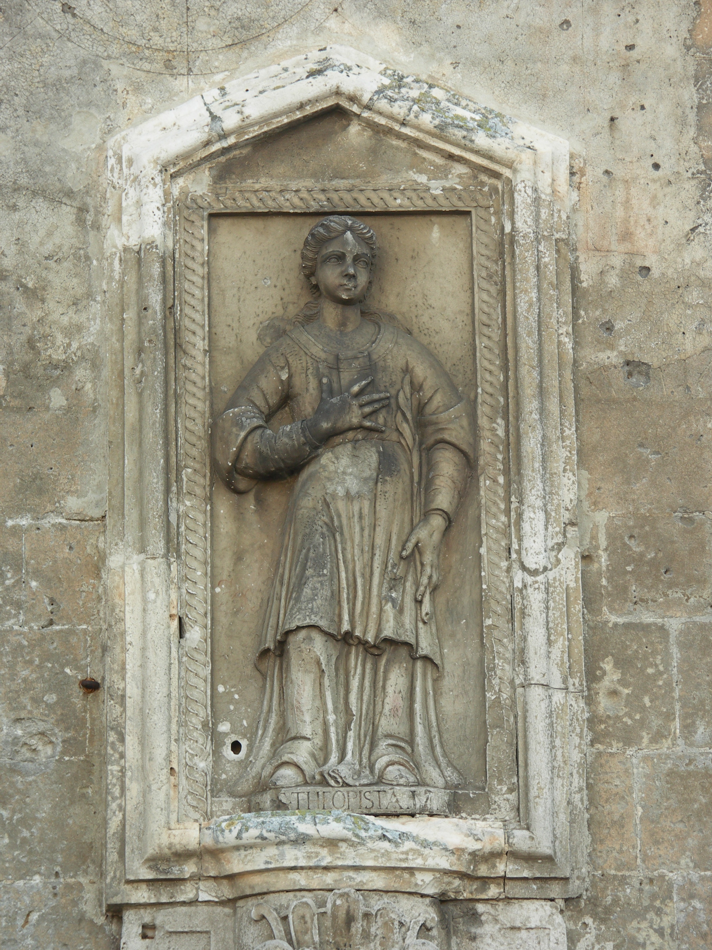 Santa Teopista Matera Duomo